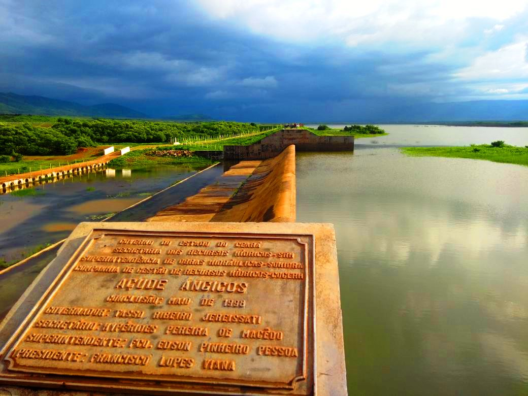 Vista do Açude Angicos, um açude brasileiro no estado do Ceará.